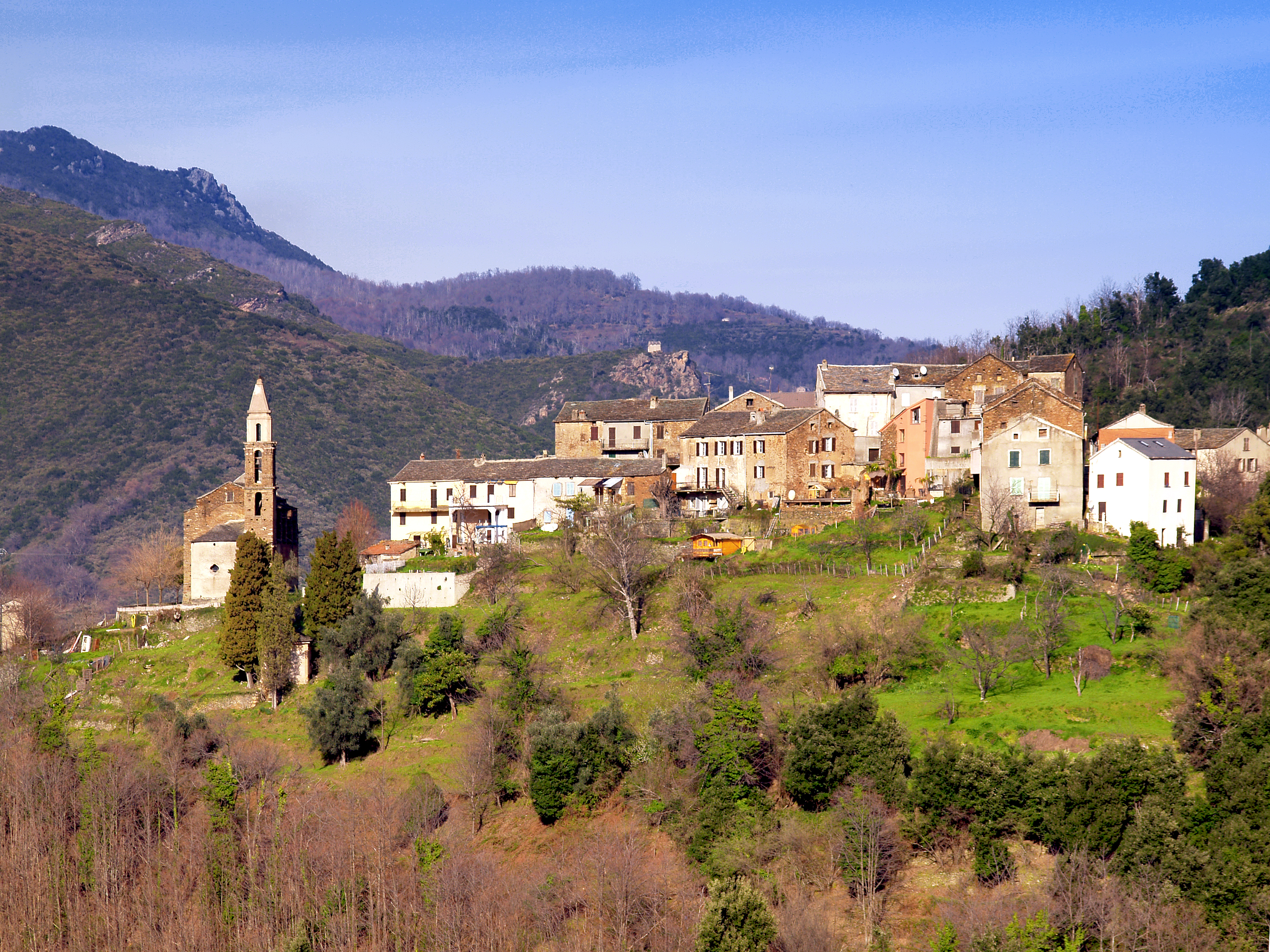 Ficaja - Le village